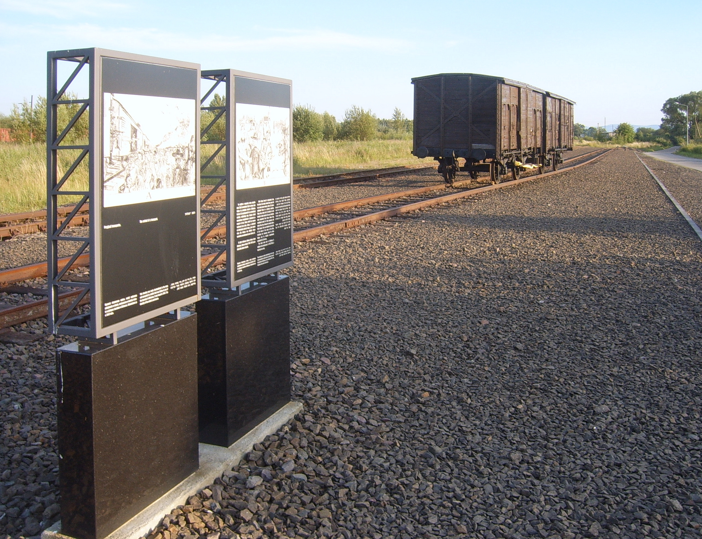 Judenrampe / Rampe d'arrivée des déportés à Birkenau